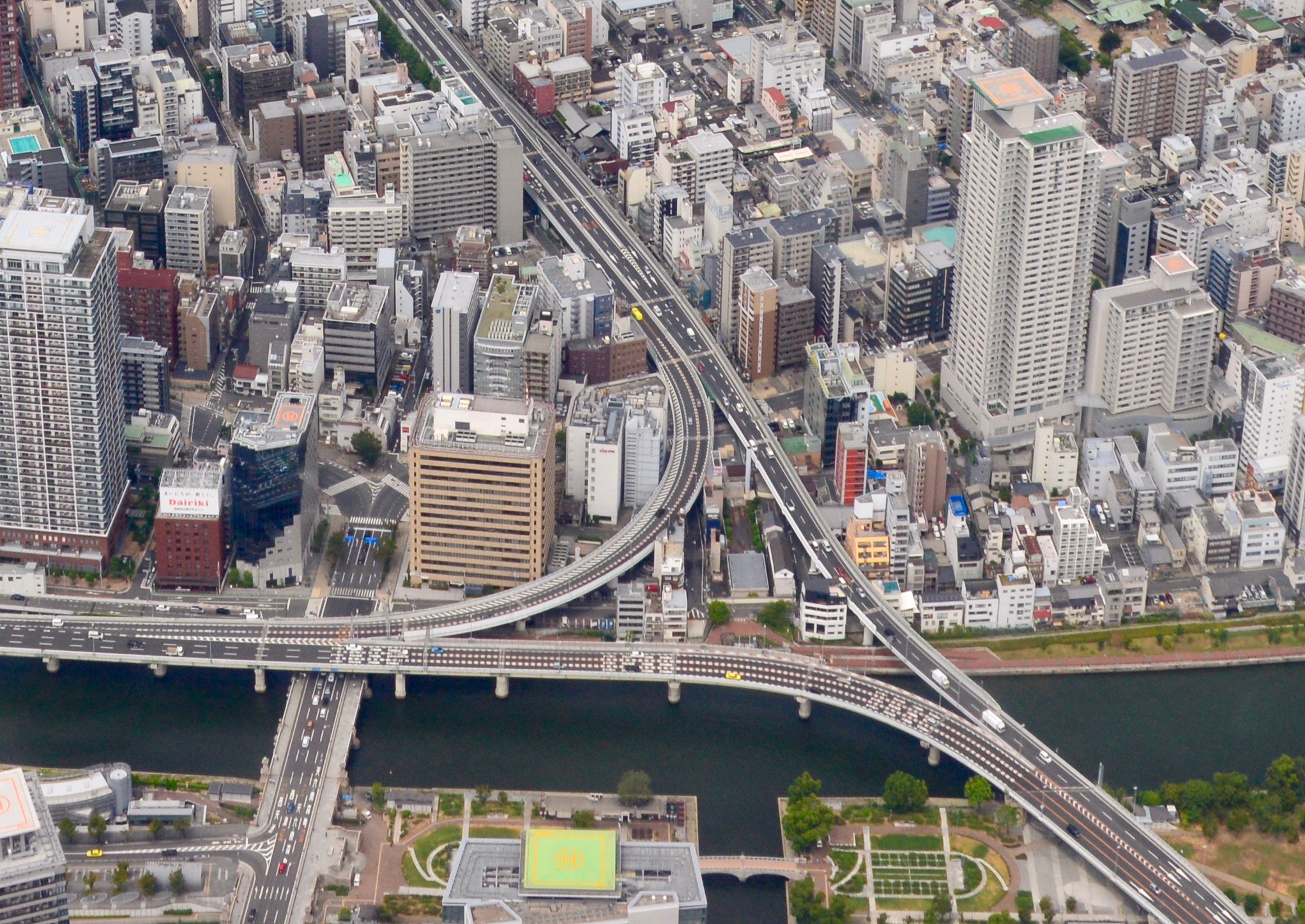 天神橋ジャンクション。伊丹空港へ向かう機内より撮影